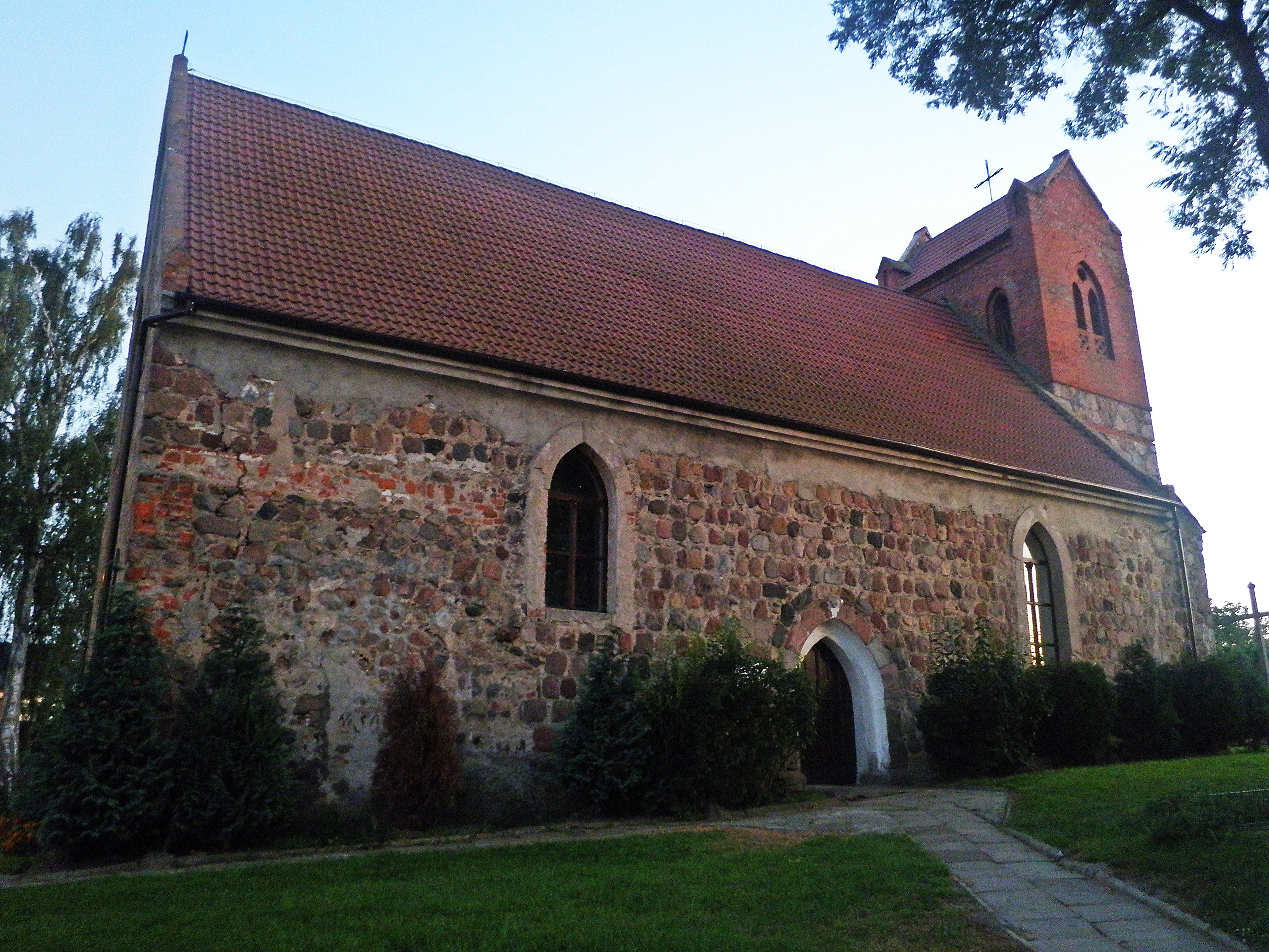 Sobieradz - kościół Niepokalanego Serca NMP wraz z otoczeniem (zabytek nr 156 z 1.08.1956)